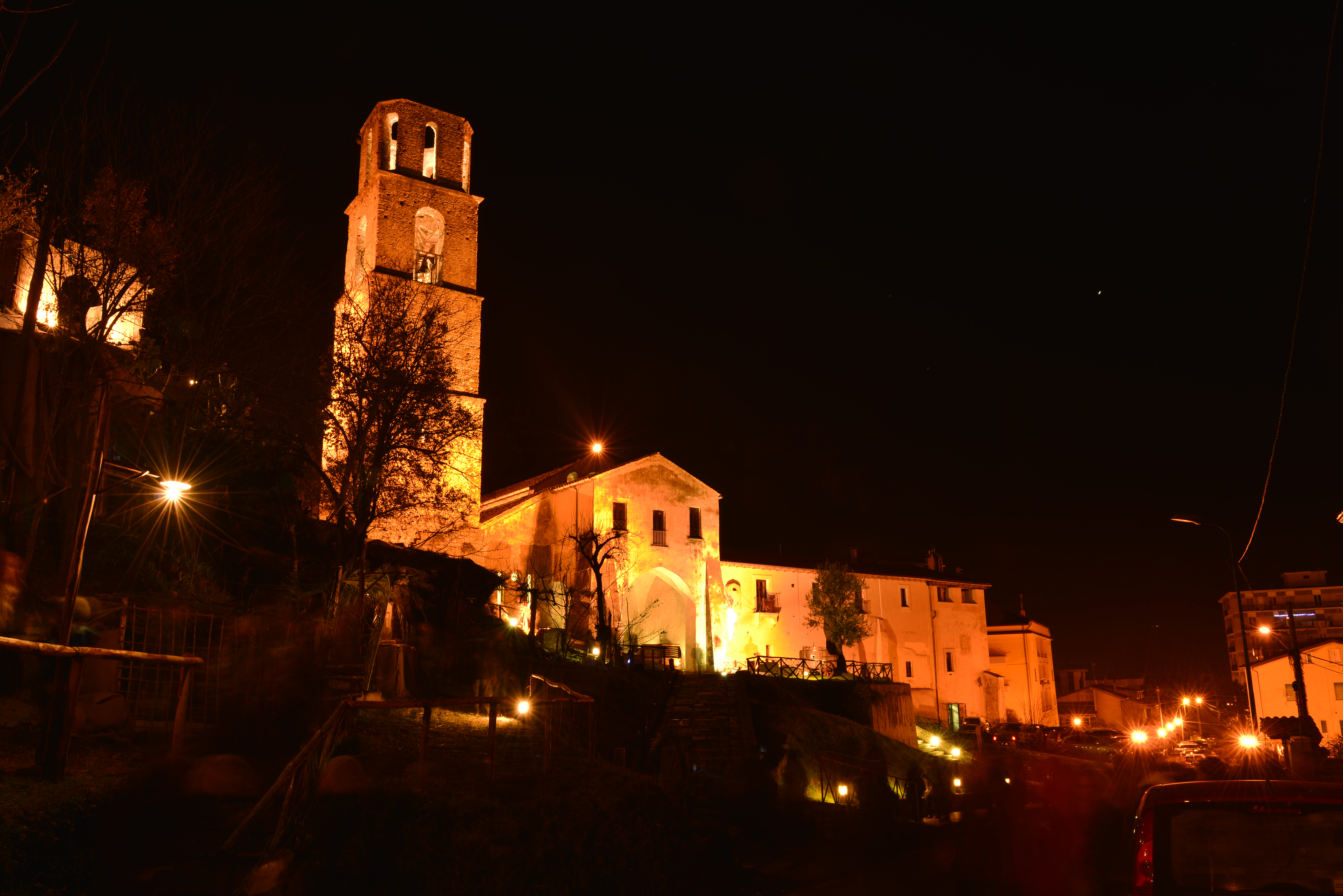 Convento di San Francesco vista notturna